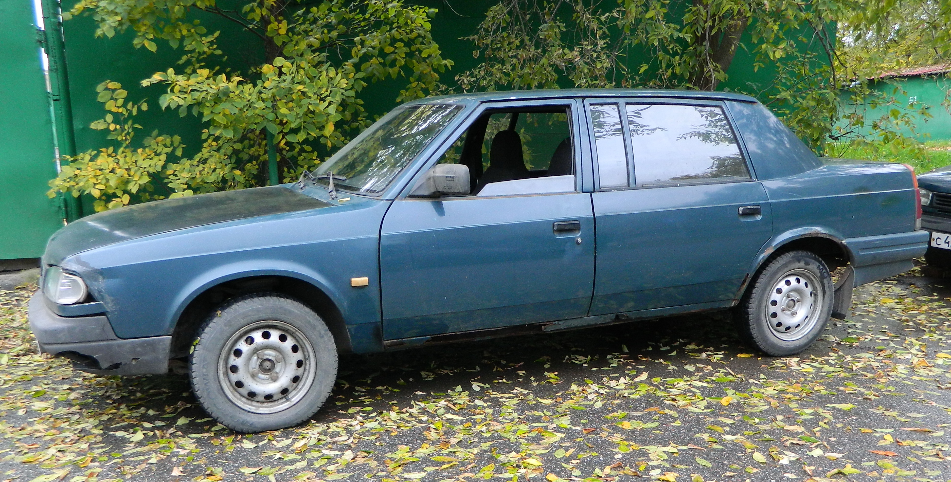 Князь Владимир 2001